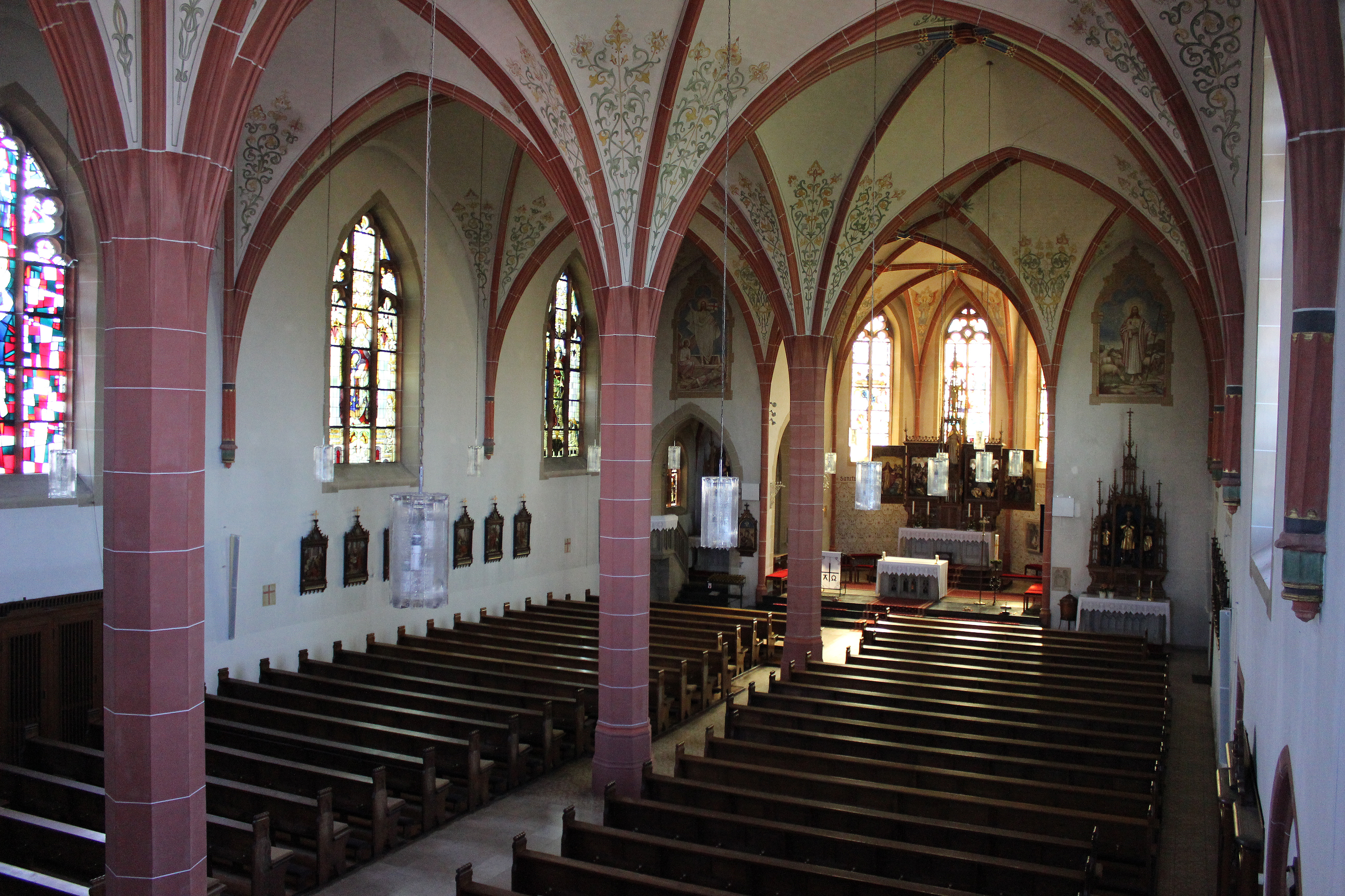 Blick ins Innere der katholischen Pfarrkirche Herz Jesu in Gresaubach, einem Stadtteil von Lebach, Landkreis Saarlouis, Saarland